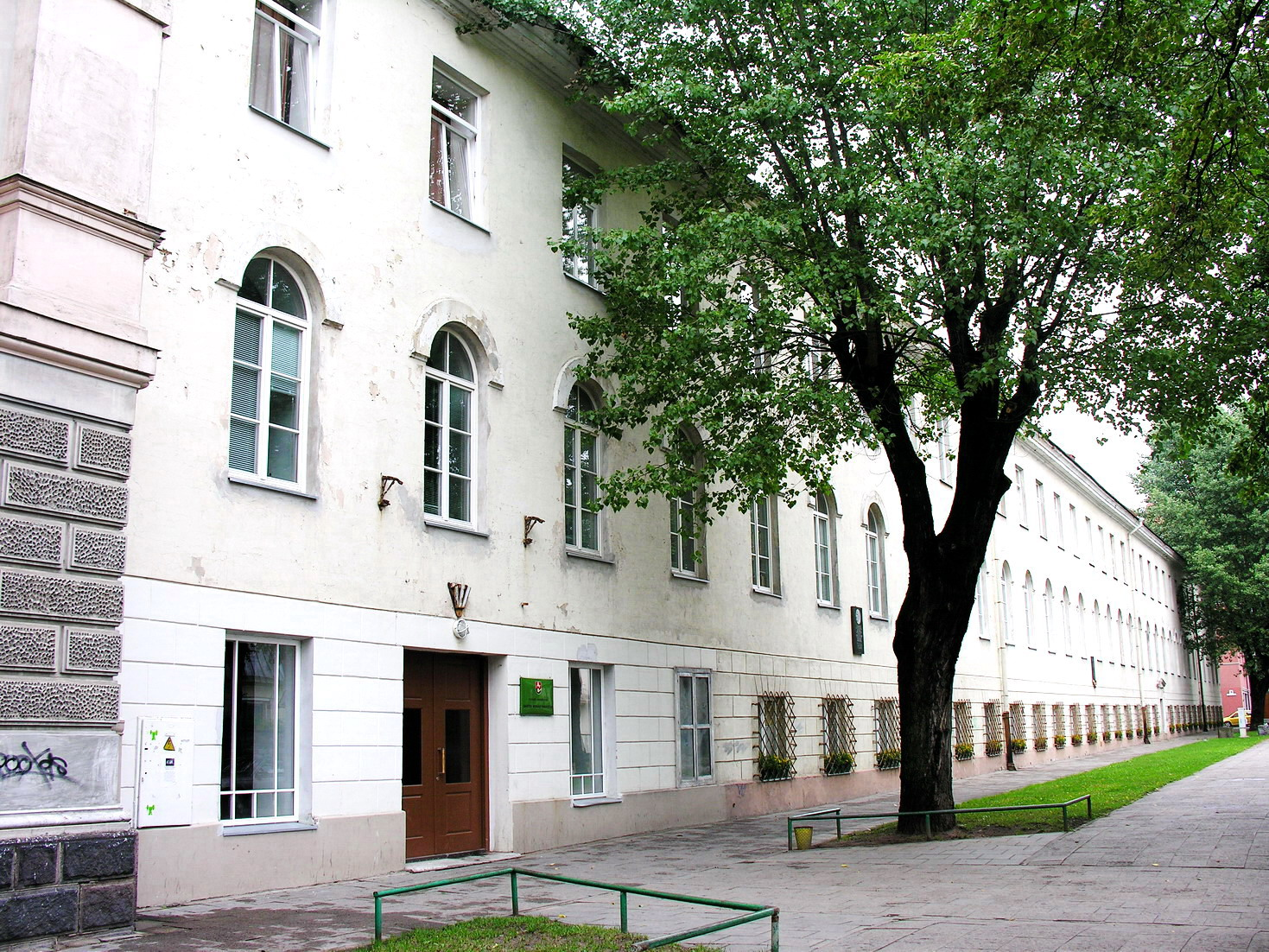 Vilniaus universiteto gamtos mokslų fakultetas Centrinis korpusas. Čia yra dekanatas, biochemijos ir biofizikos katedra, bendrosios geografijos katedra, hidrologijos ir klimatologijos katedra, zoologijos katedra, geologijos ir mineralogijos katedra, kartografijos centras, ekologijos ir aplinkotyros centras ir kt. Foto: Algirdas, 2006 m. rugpjūčio 8 d., Lietuva